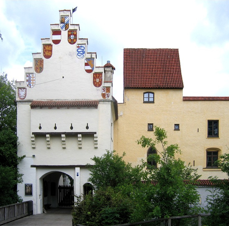 Burg Gruenwald Eingangstor Photograph: Rufus46 Date: 05.06.2006